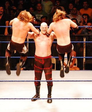 ritaglio di File:Kane_Double_Chockeslam.jpg